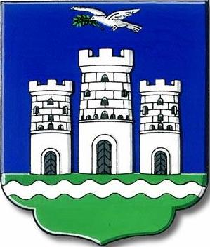 Грб Новог Сада из 1748. године